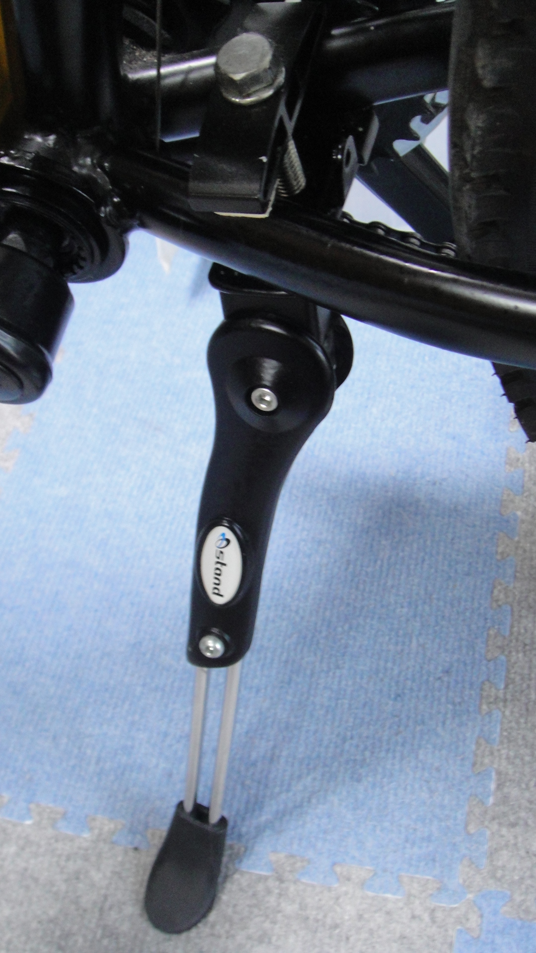 自転車用片足センタースタンド